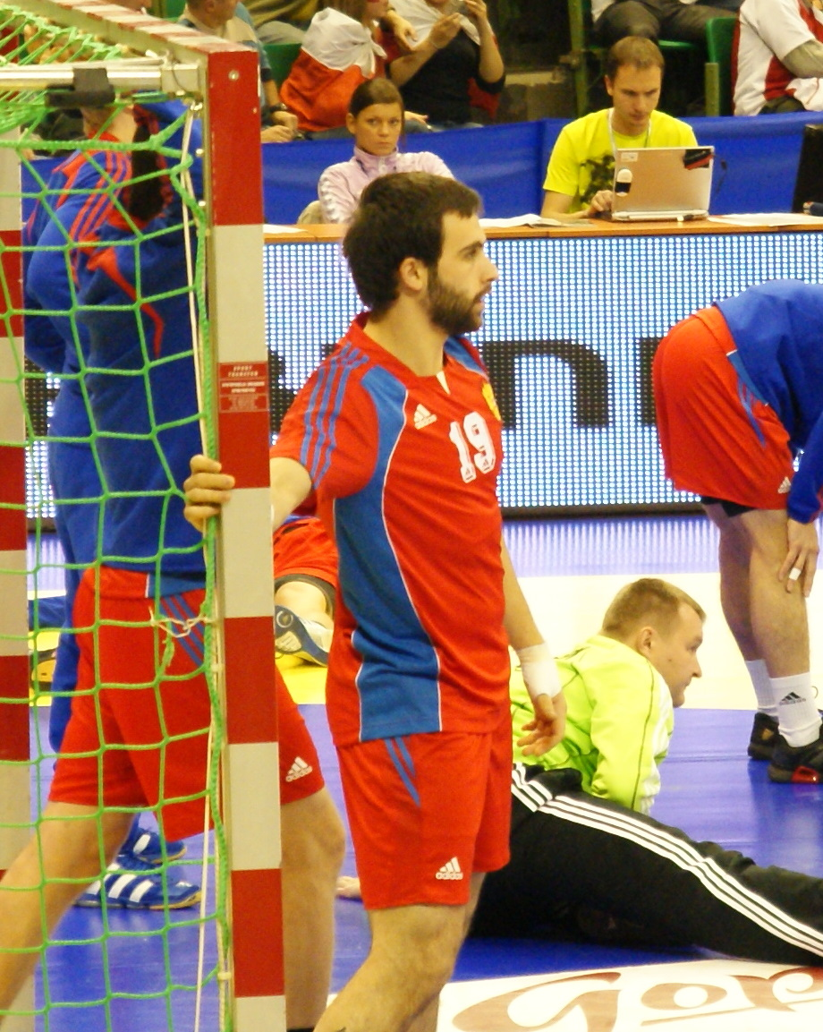 Samvel Aslanyan Mecz Polska - Rosja, Turniej Reprezentacji Narodowych Mężczyzn w Piłce Ręcznej, Hala widowiskowo-sportowa Arena, Poznań, Polska.